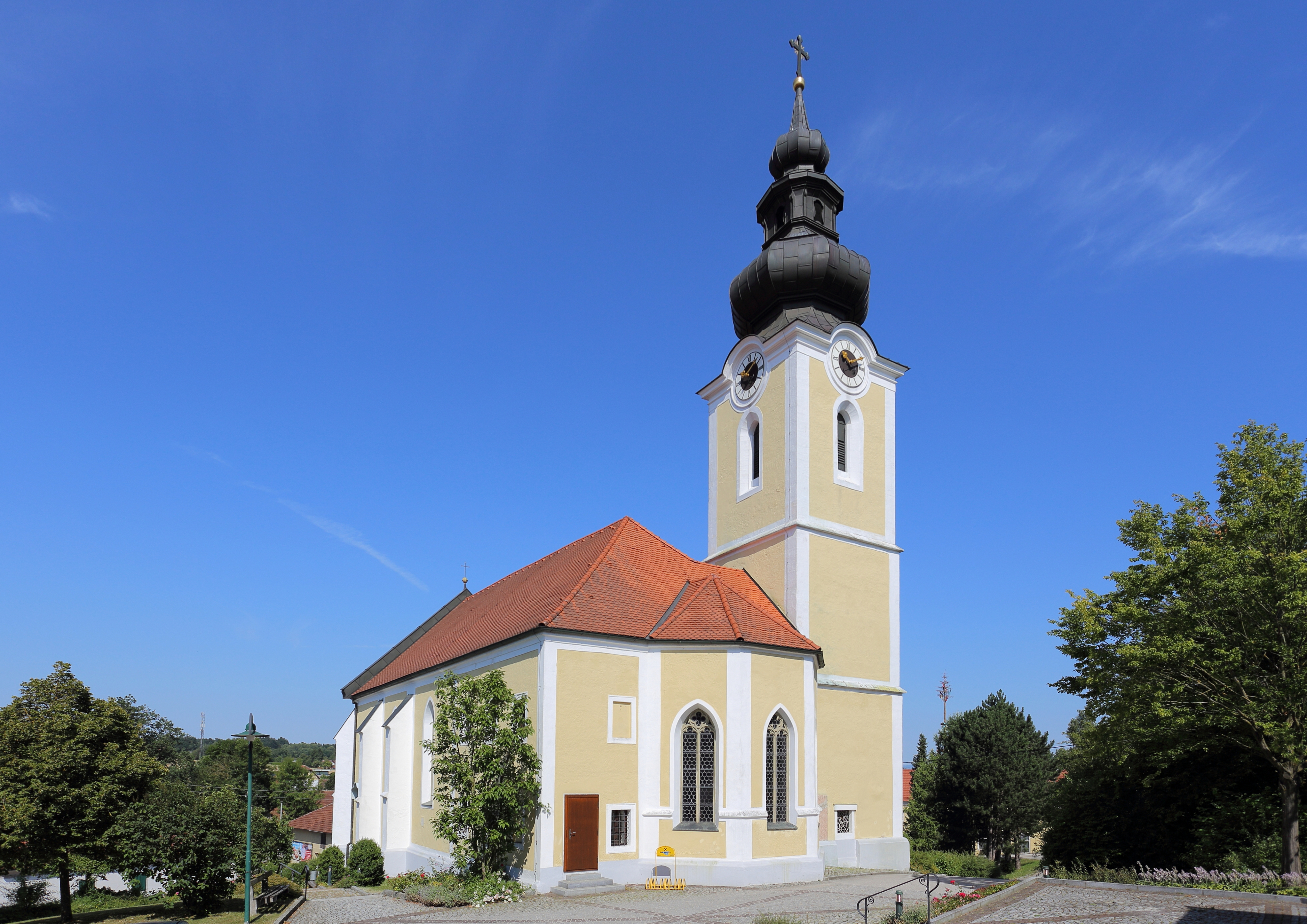 Katholische Pfarrkirche hl. Margarethe in der oberösterreichischen Marktgemeinde Prambachkirchen. Eine spätgotische Hallenkirche aus dem 1. Viertel des 16. Jahrhunderts. Der Turm mit dem aufgestetzen Zwiebelhelm wurde 1835 errichtet.